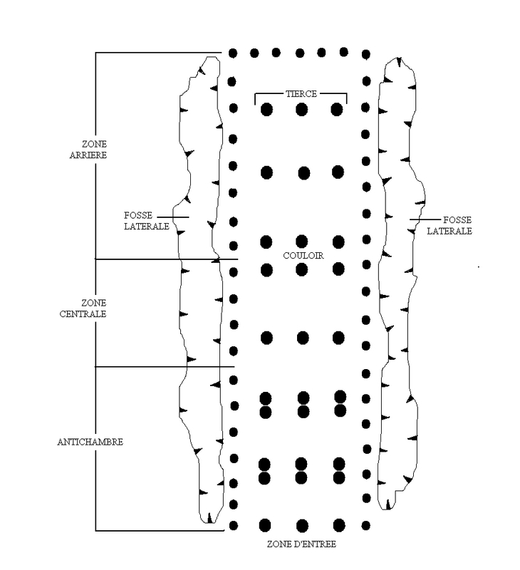 Schéma d'un plan de maison rubané